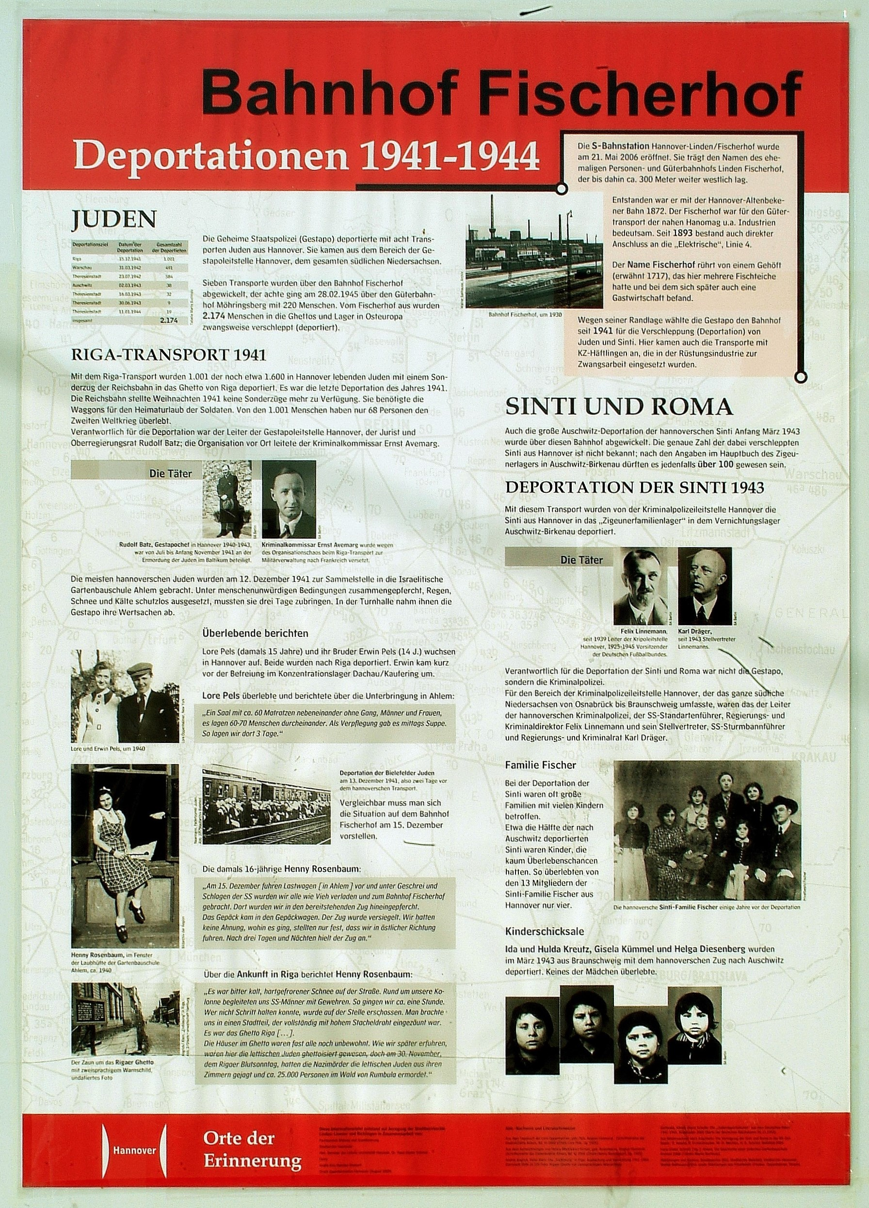 Plakat der Stadt Hannover in der Reihe "Orte der Erinnerung am Hochbahnsteig der Stadtbahn Hannover/Brückenpfeiler des S-Bahnhofs Hannover-Linden/Fischerhof: Unter der Überschrift "Bahnhof Fischerhof / Deportationen 1941-1944" werden ausführliche Informationen mit Bilddokumenten öffentlich präsentiert zu dem in der Nähe gelegenen Bahnhof und dem dort erlittenen Unrecht. Namentlich benennt das Plakat betroffene Täter und Opfer des NS-Unrechts ...